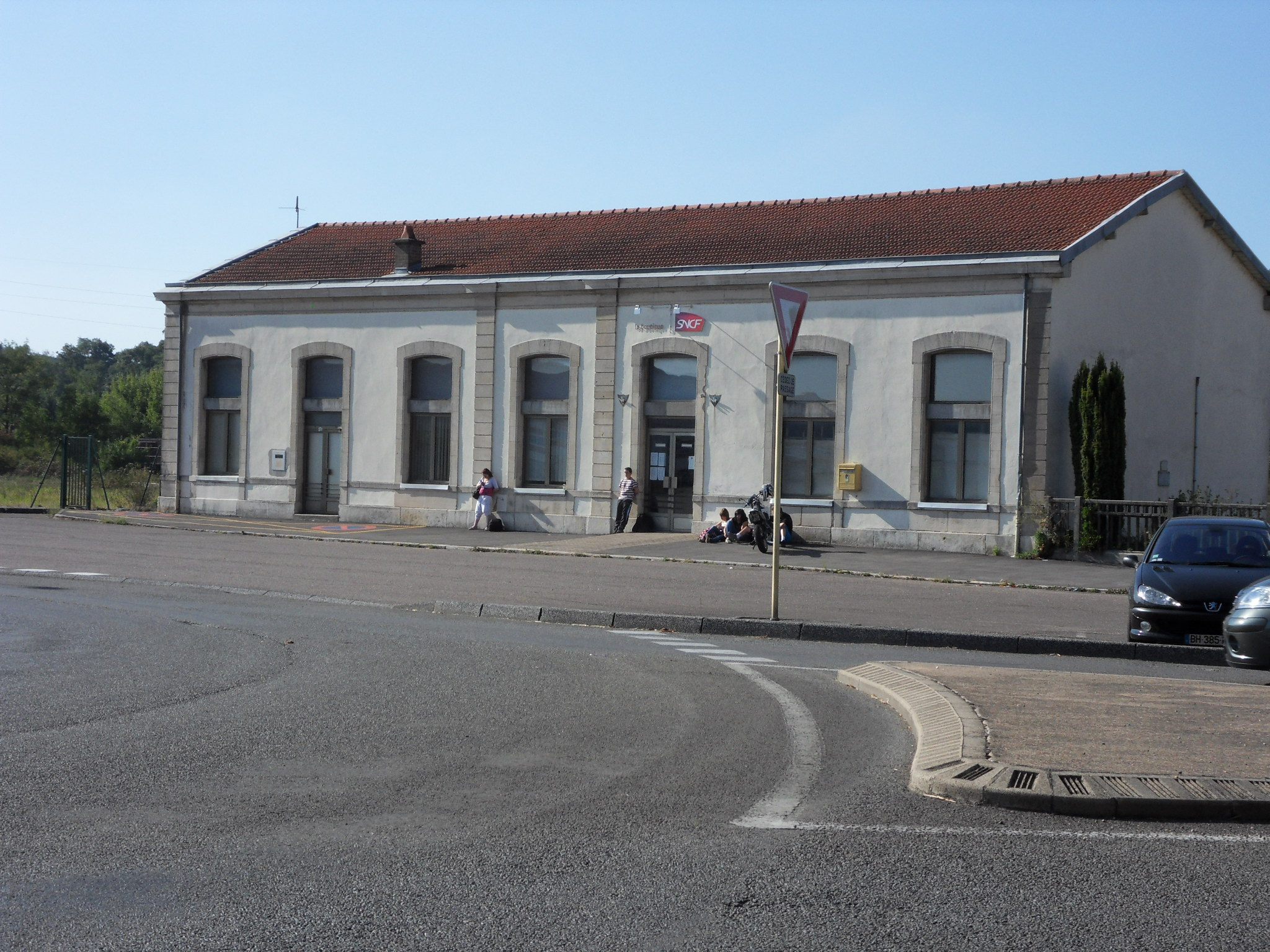 Gare de Gray. Le bâtiment voyageurs